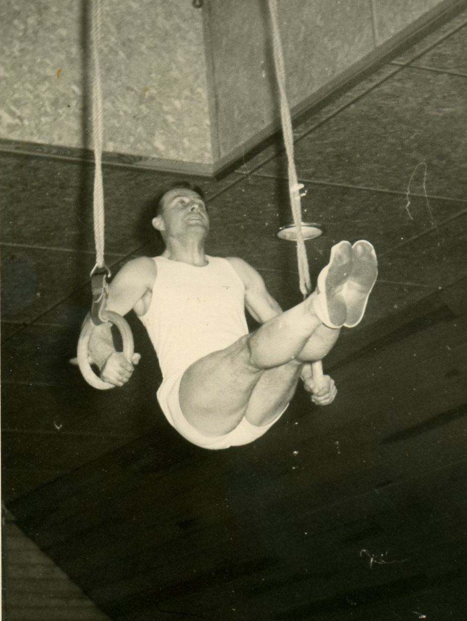 Walter Behrens an den Ringen